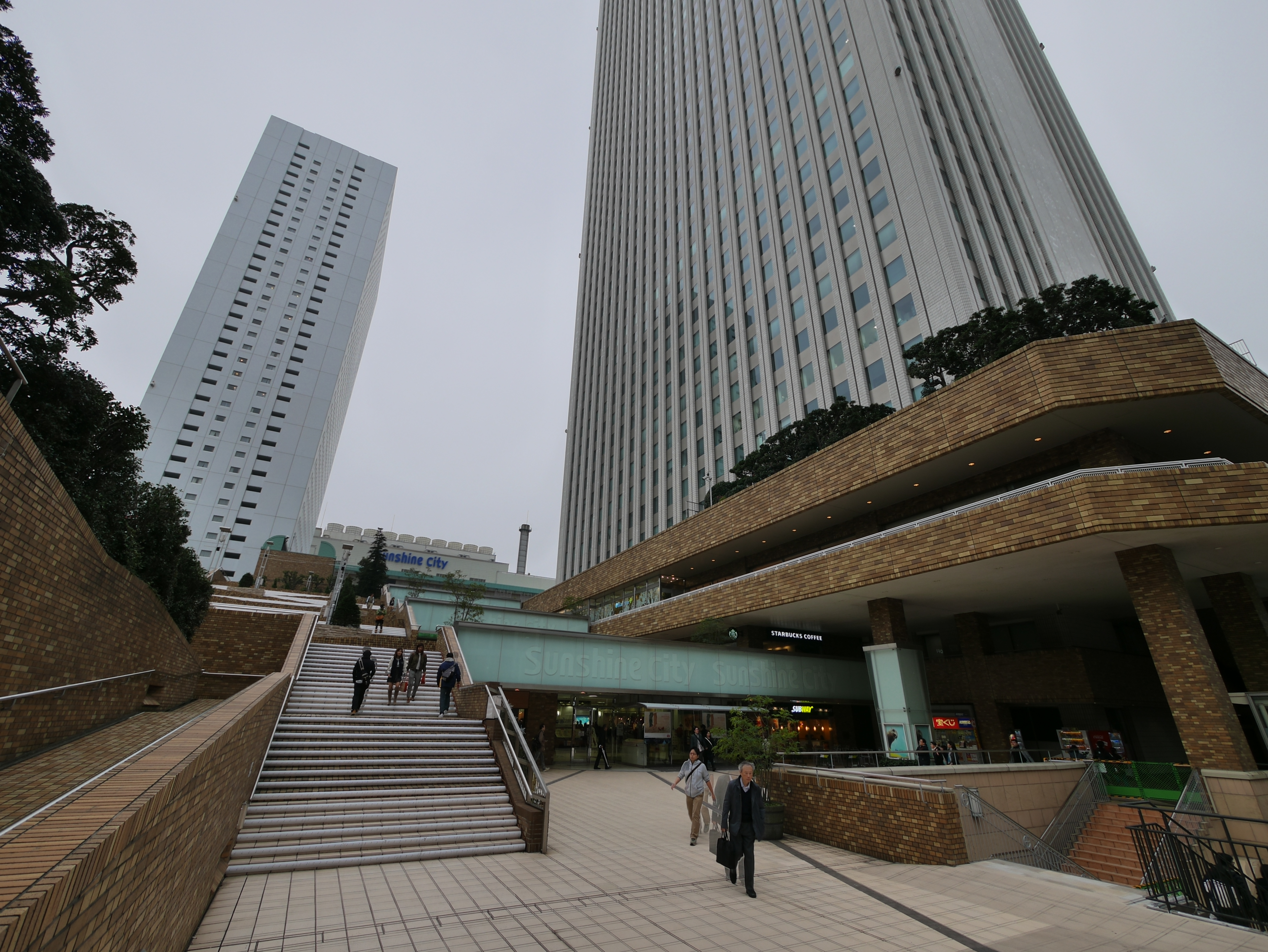 1 Chome Nishiikebukuro, Toshima-ku, Tōkyō-to 171-0021, Japan